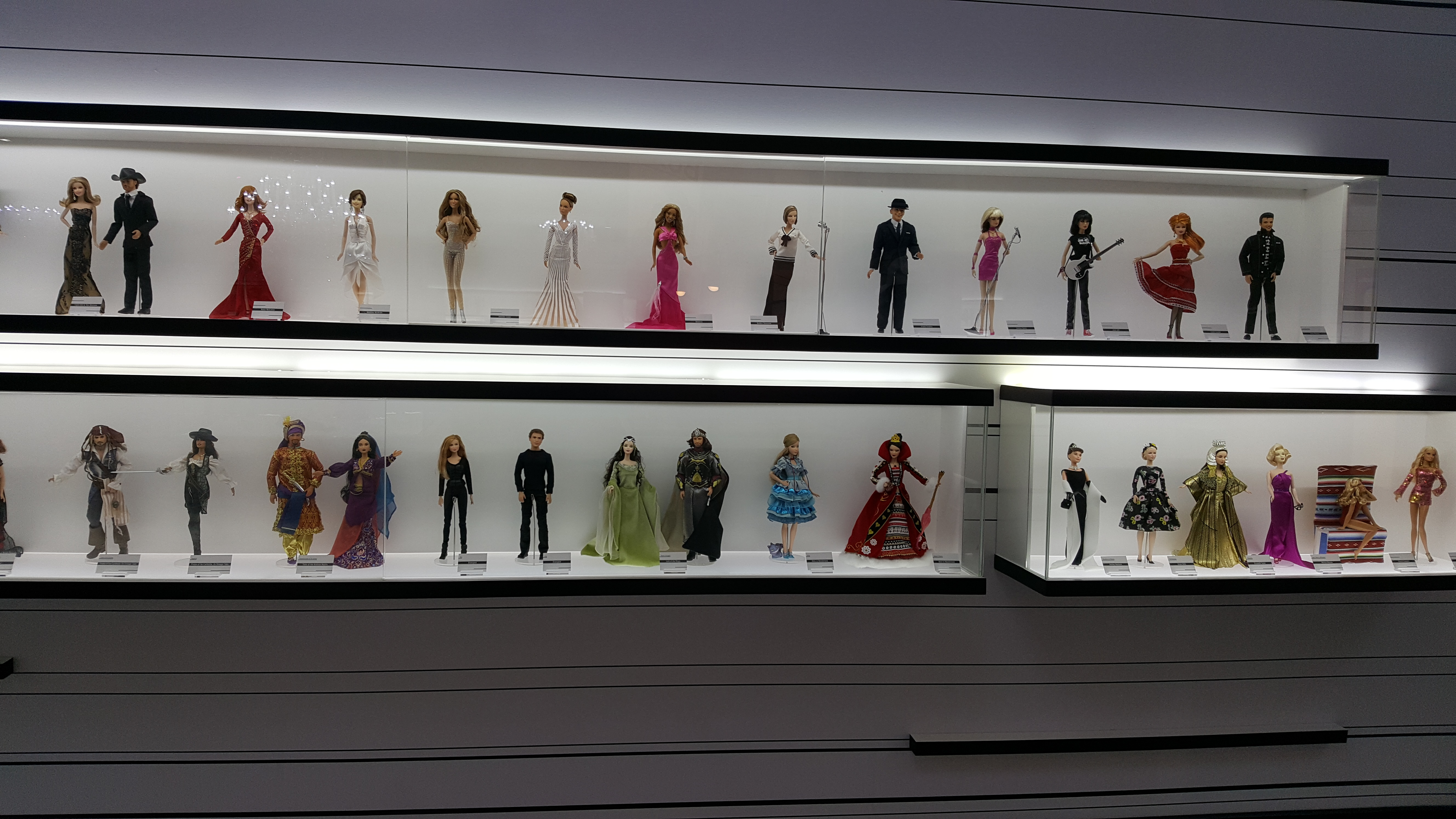 Wikimania 2017 by Ovedc - Wikimania 2017 post-conference - Barbie dolls